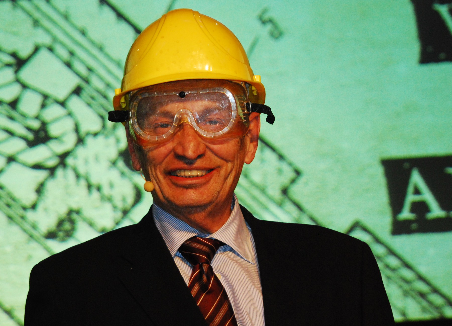 Heinz Oberhummer bei einem Auftritt als Science Buster in Wien